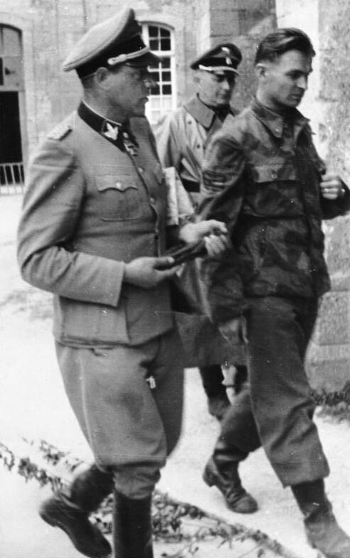 12. SS-Panzer-Division "Hitlerjugend" Fritz Witt, Max Wünsche Juni 1944 im Kloster Ardenne bei Caen [Invasion] Aufnahme: Woscidlo